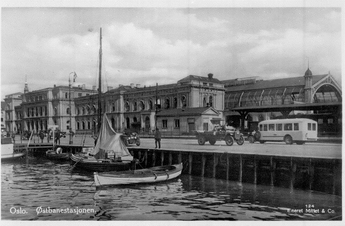 Østbanen sett fra sjøsiden. Christian Frederiks plass. Robåter og seilskute ved Paléhavna langs Havnegata. Buss, biler, gående. Postkort 124.